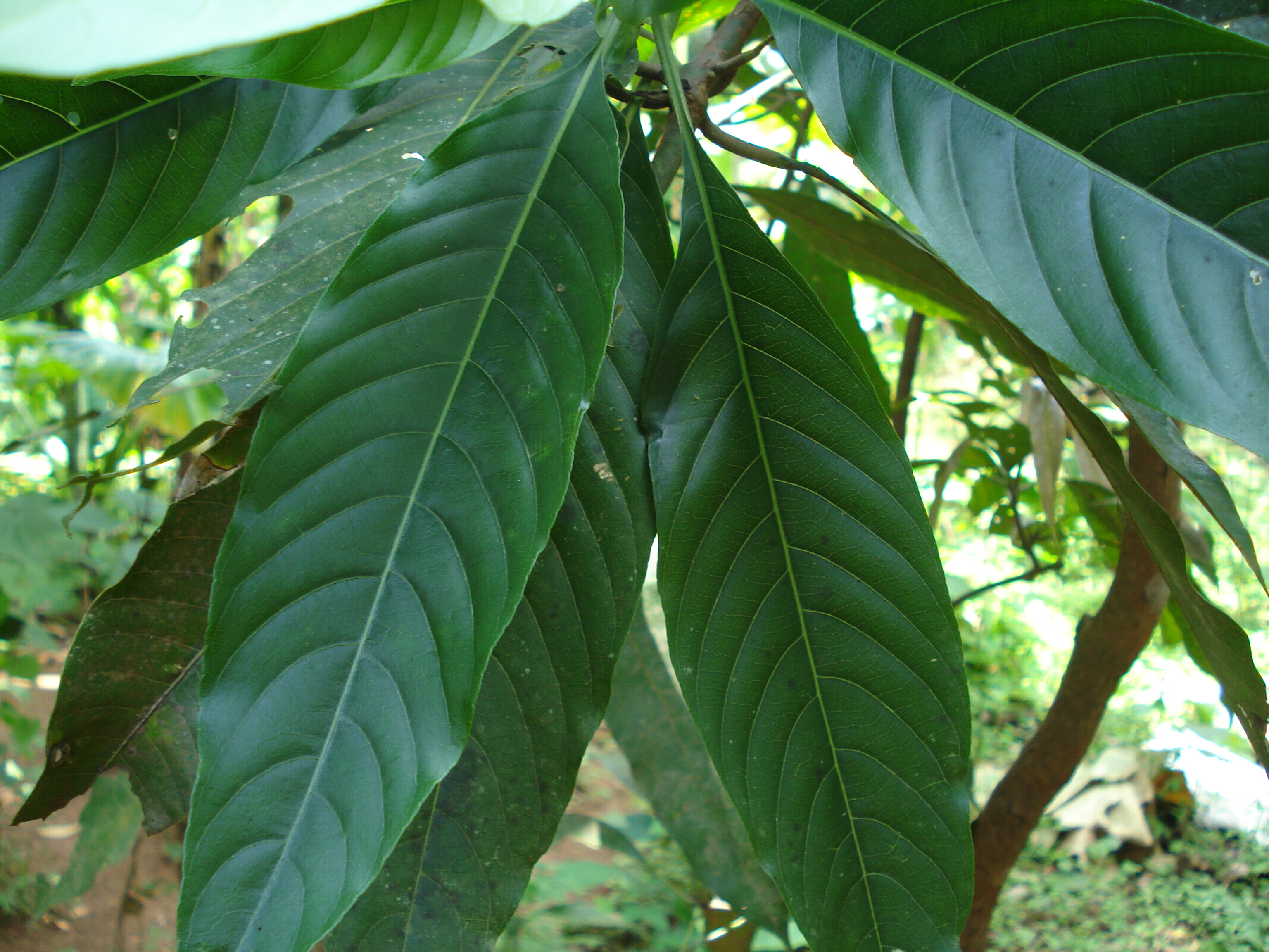 ആടലോടകം